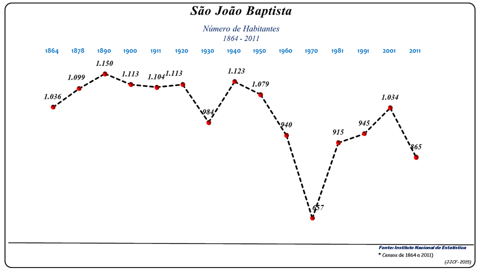 Evolução da População